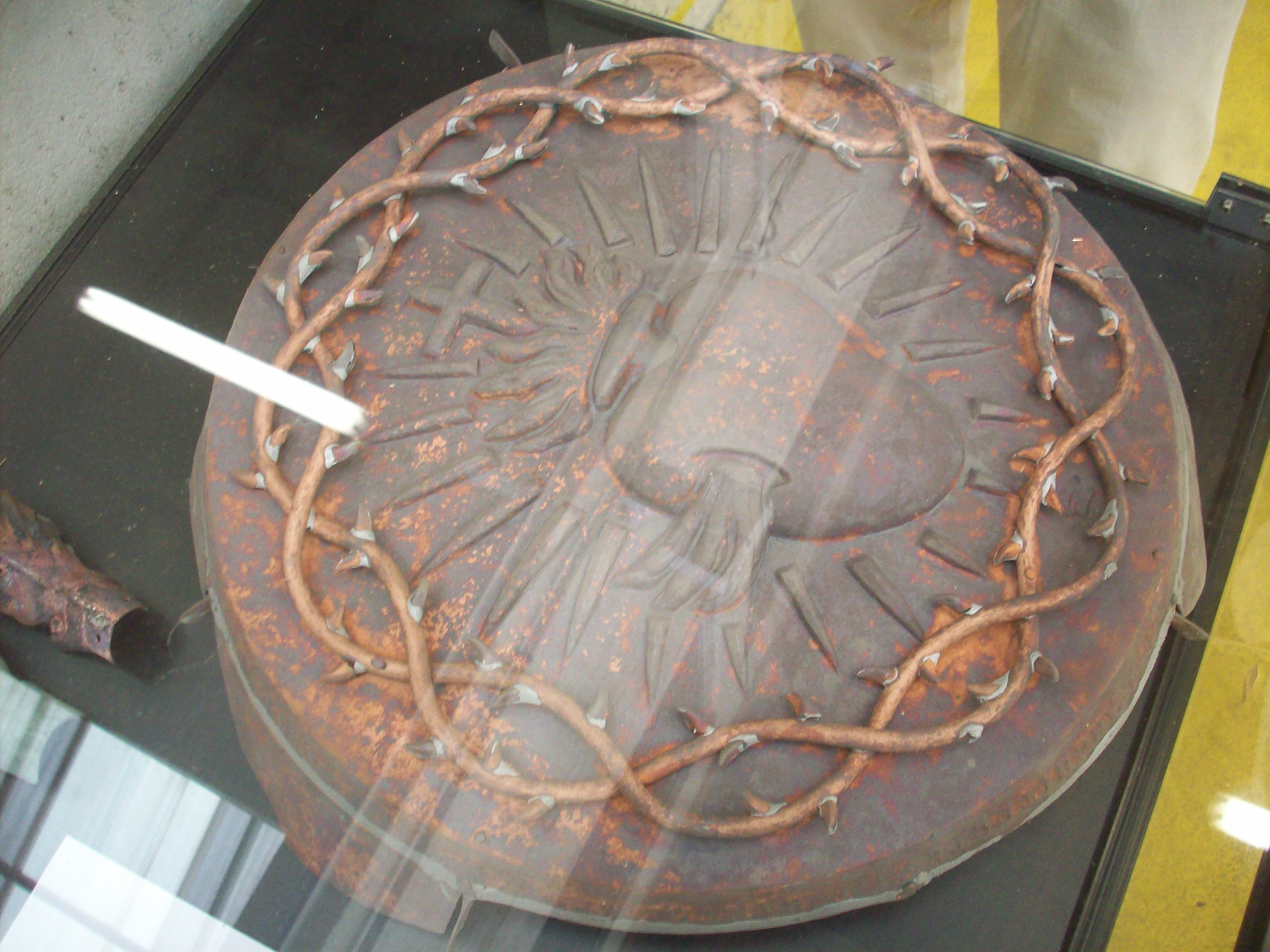 Médaillon du premier clocheton posé sur la cathédrale. "CE MEDAILLON A ETE OFFERT A L'EGLISE METROPOLITAINE DE ROUEN PAR L'ARCHITECTE J.E BARTHELEMY LE II FEVRIER MDCCCLXXXI LD"